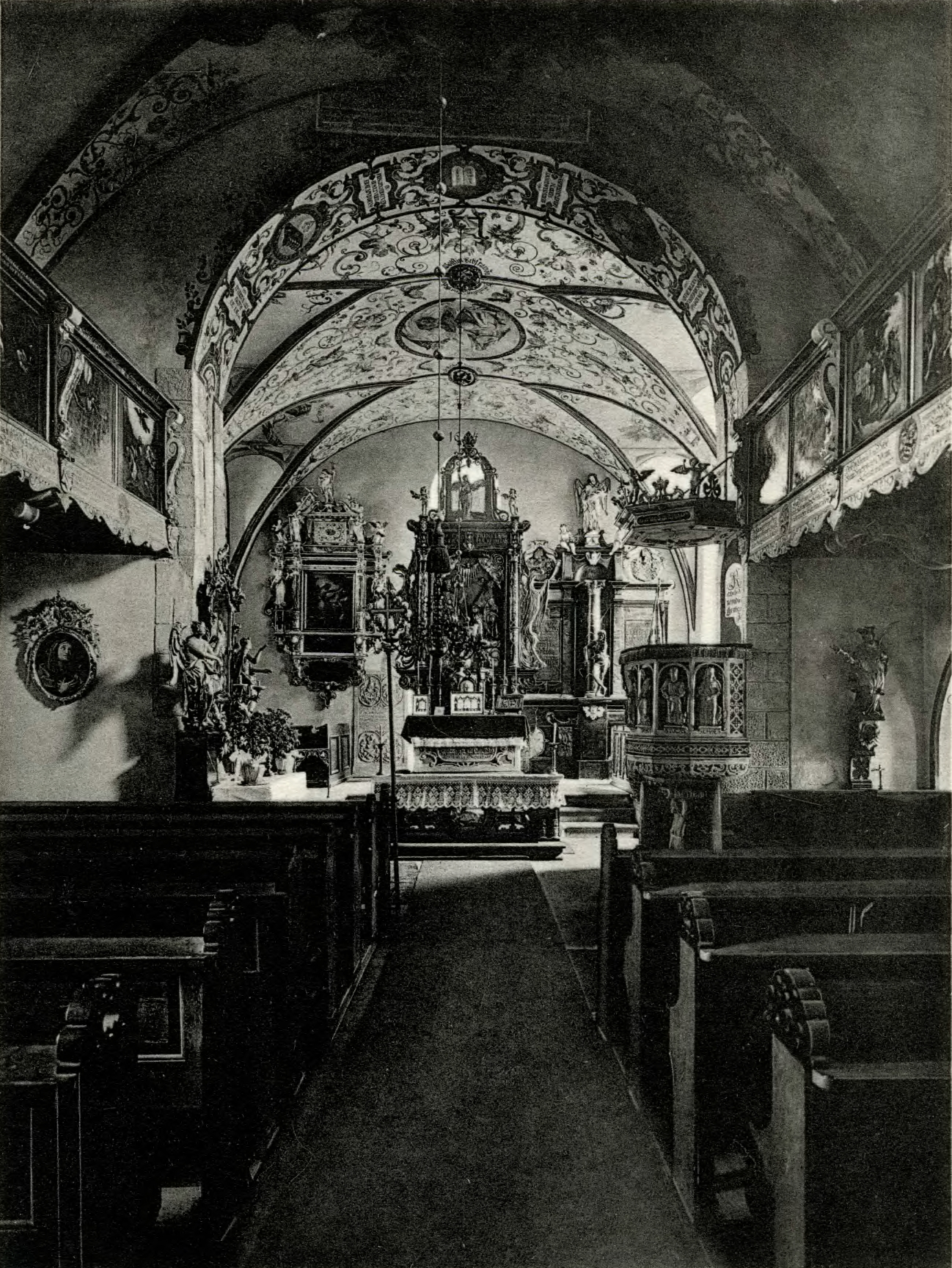 Żórawina, Al. Niepodległości - kościół pomocniczy pw. św. Trójcy (zabytek nr A-1252-88)